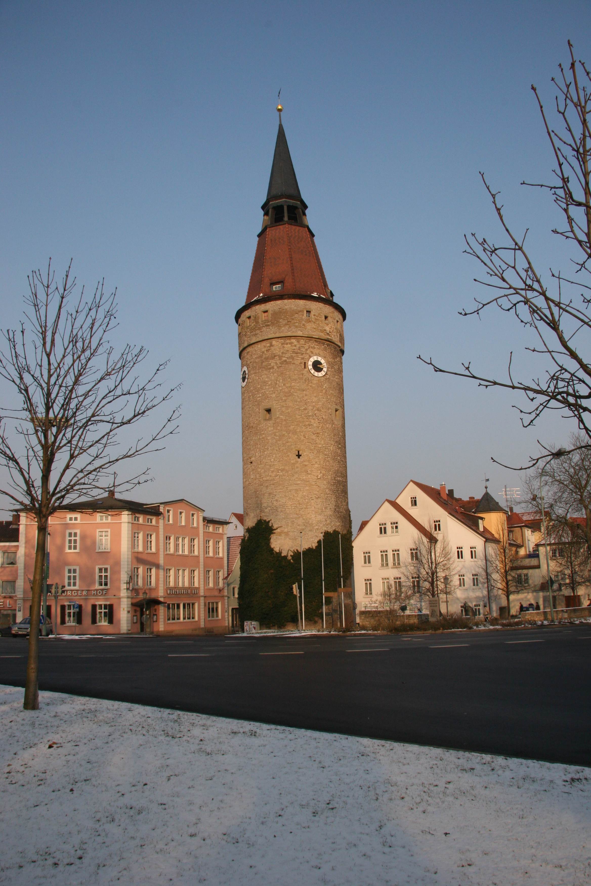 Falterturm in Kitzingen, Germany. Wegen seiner schiefen Turmspitze auch schiefer Turm von Kitzingen genannt.